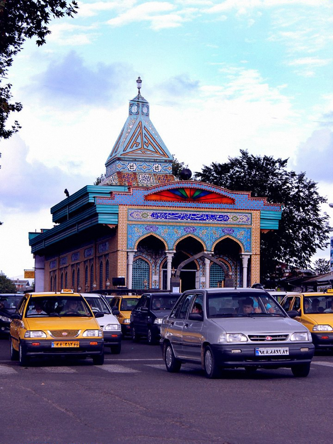 مقبره ی دانای علی در رشت